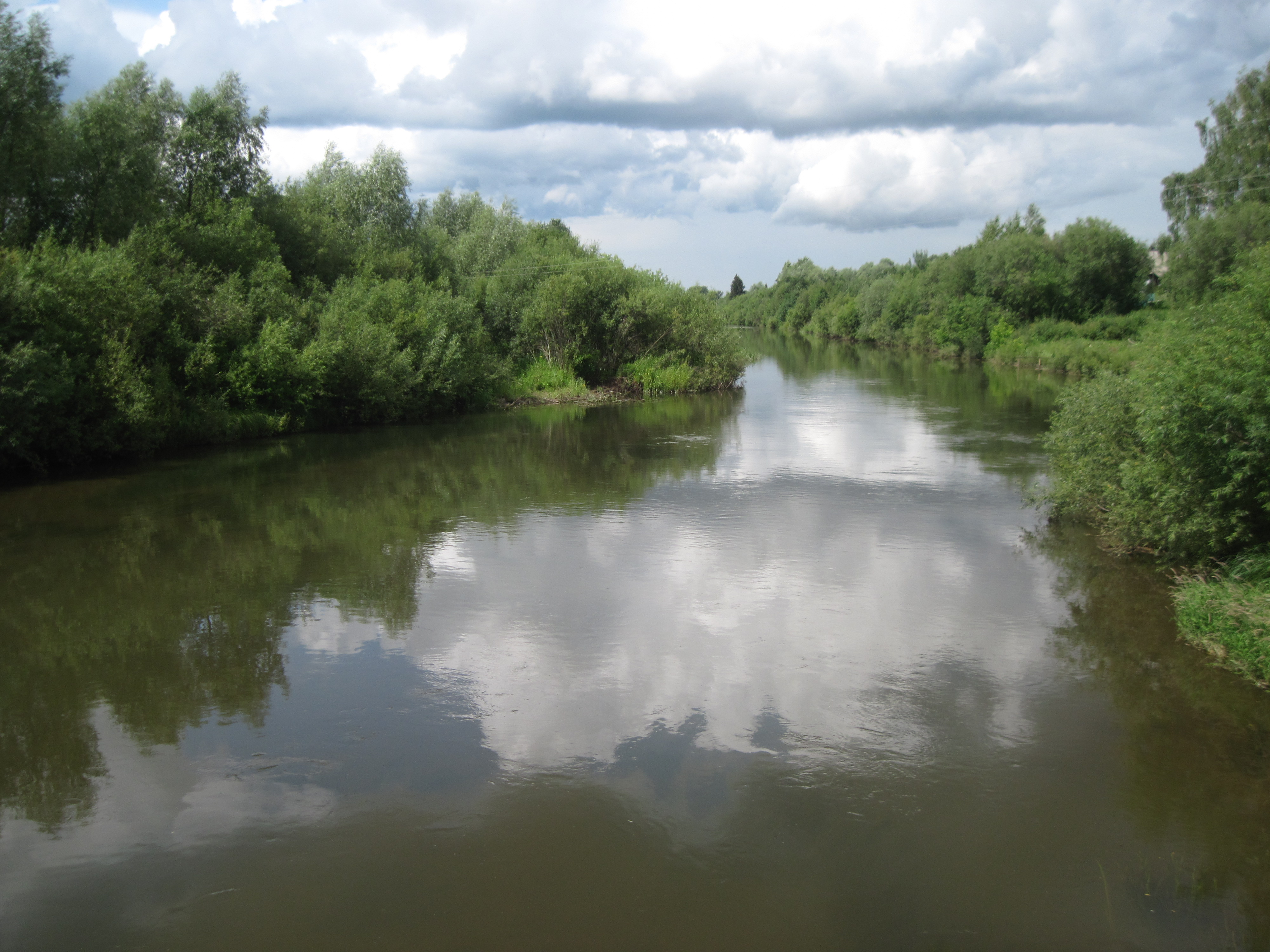 Приток реки Лозы.Удмуртская республика,Игринский район,село Зура